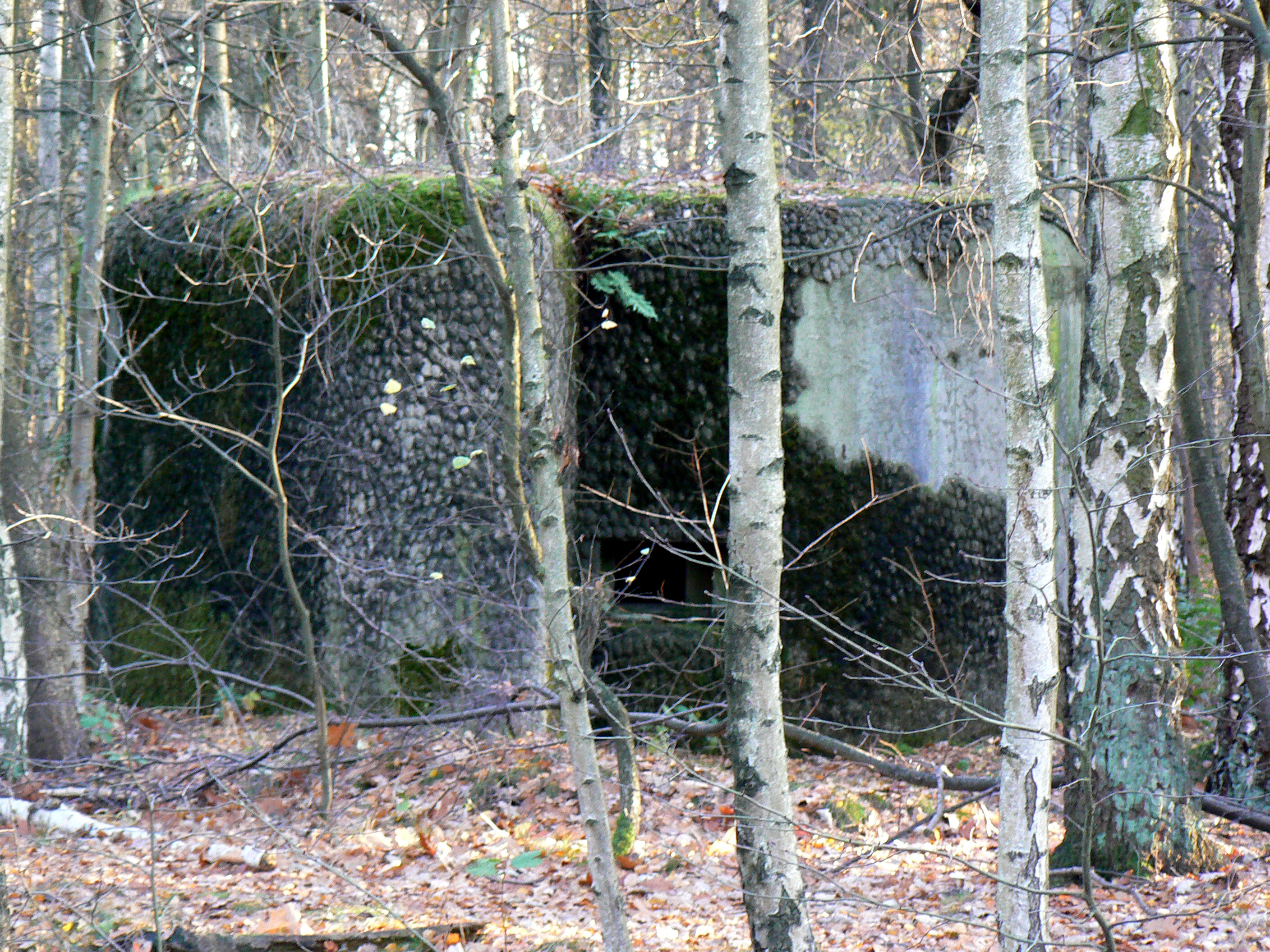 Wachtbunker, Antitankgracht, Kapellen (Belgium)